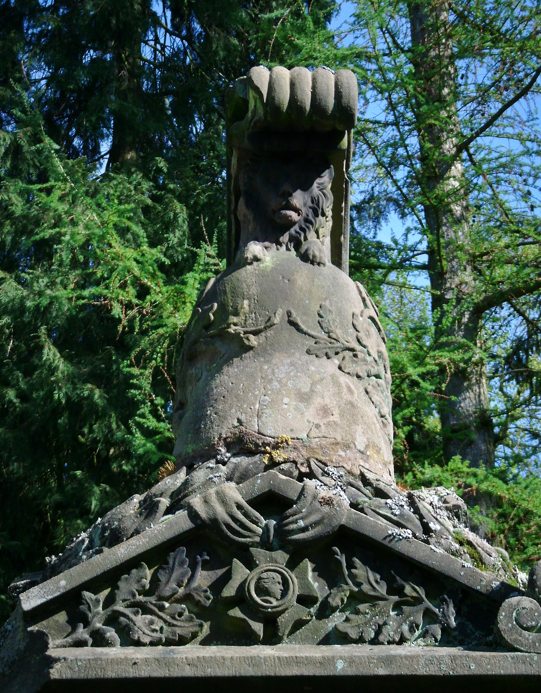 Friedrich von Esebeck (1769-1852), österreichischer u. französischer Offizier, Offizier der Ehrenlegion, Detail vom Grabstein mit Kreuz der Ehrenlegion, Hauptfriedhof Zweibrücken